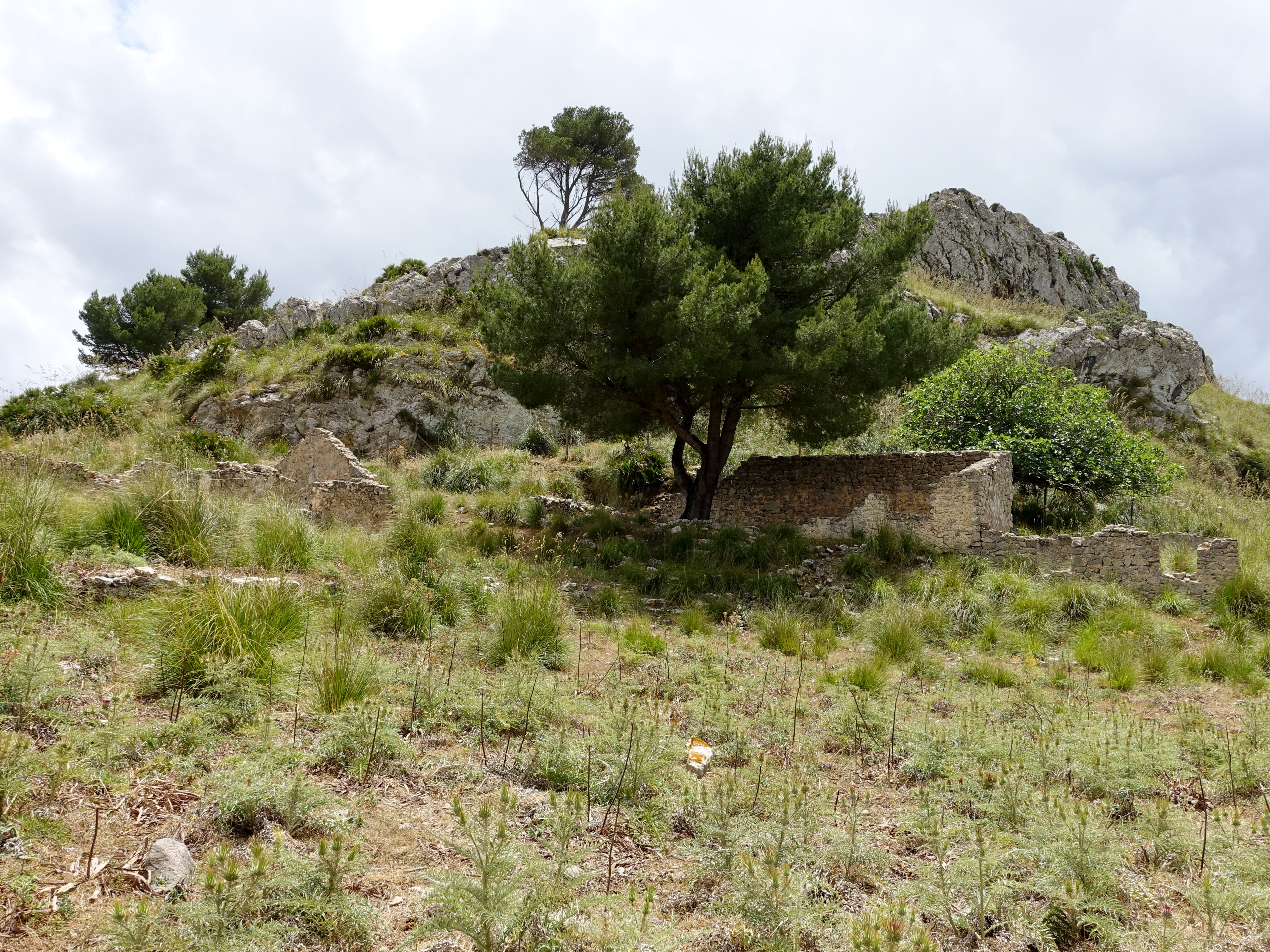 Campament dels Soldats, Gemeinde Artà, Mallorca, Spanien